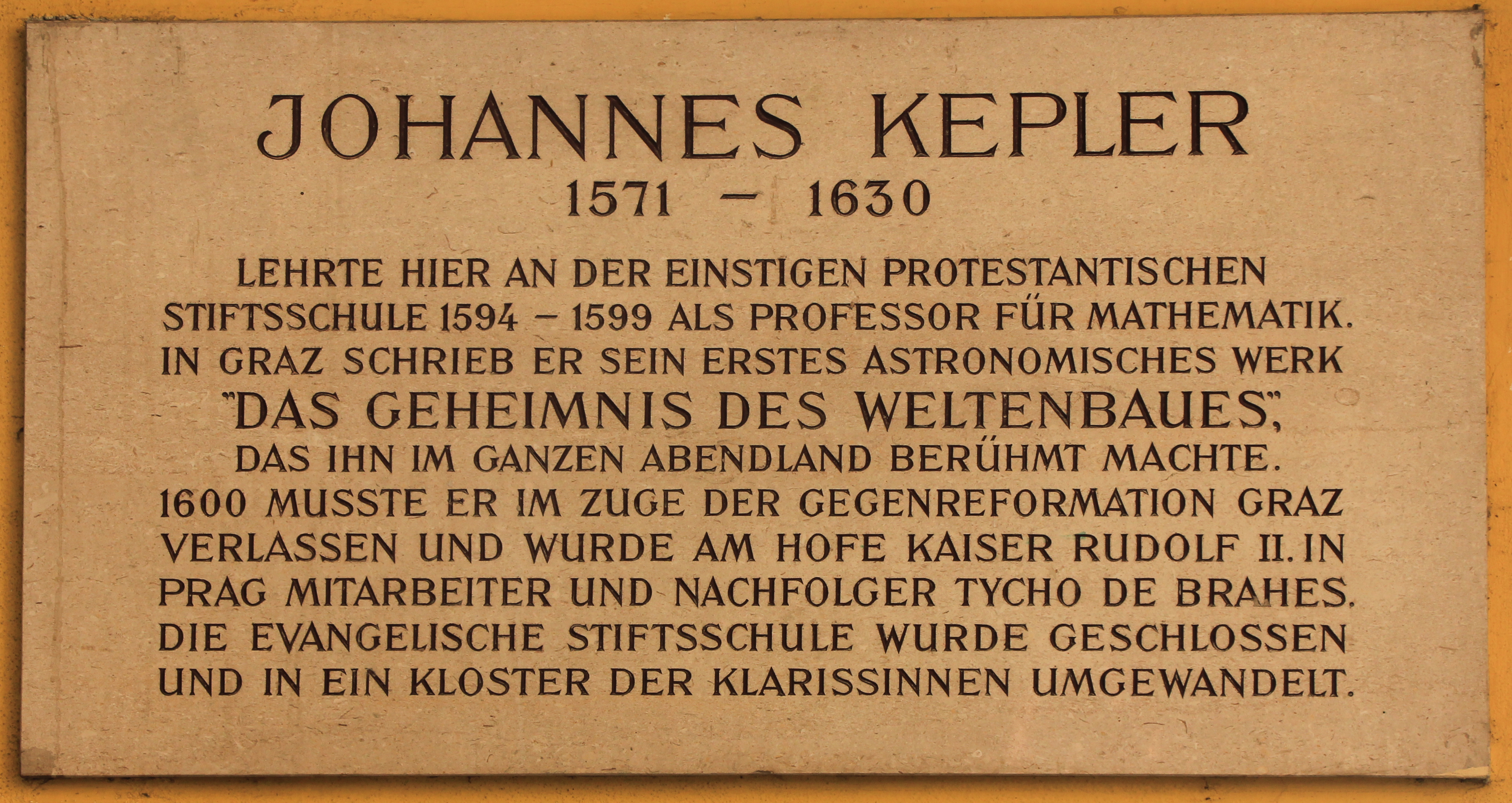 Gedenktafel an Kepler in Graz, im Grazer Paradeishof in der Badgasse